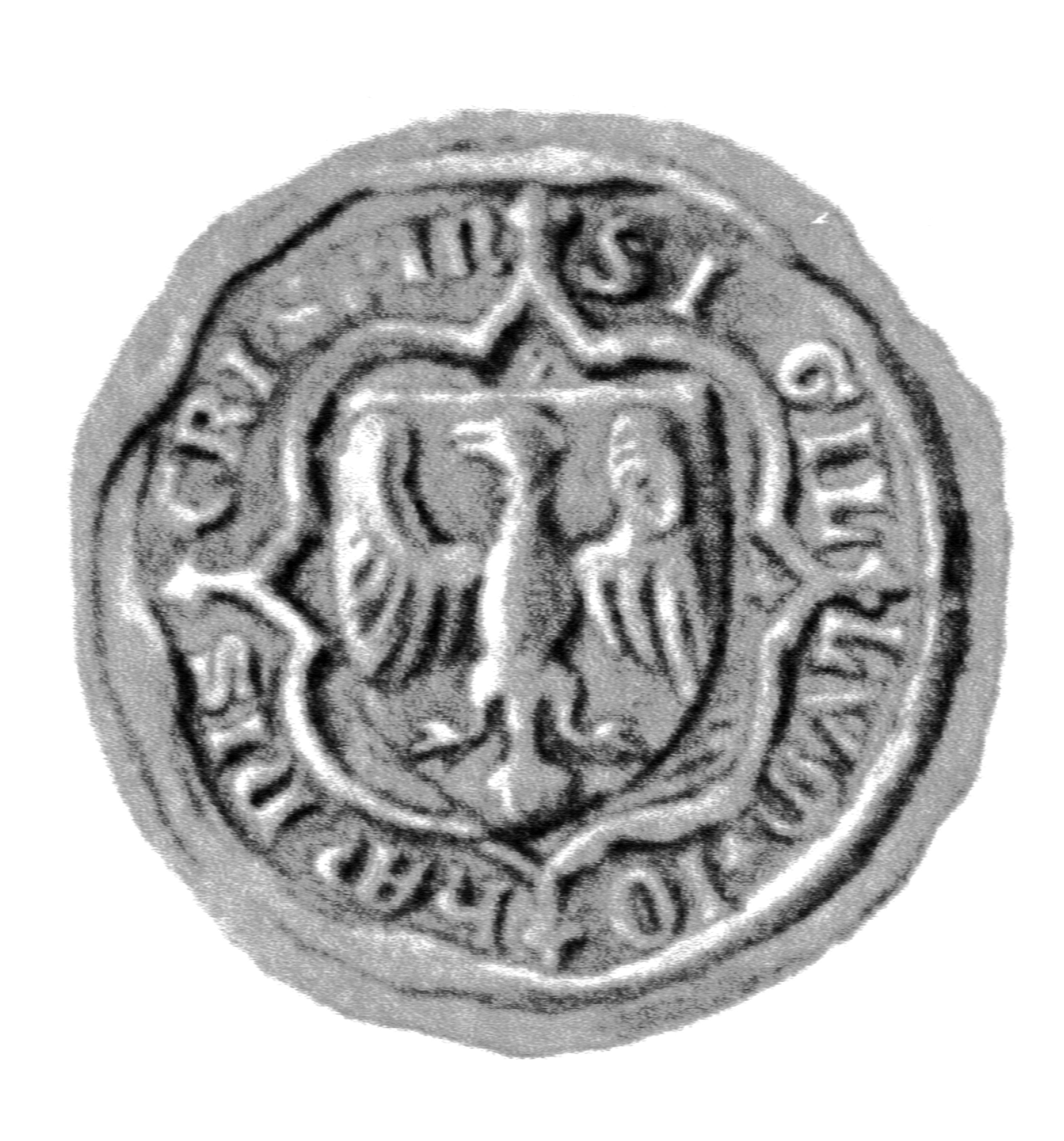 Siegel des Ratsmannes Johann Crispin. Das Siegel stammt aus der Zeit um 1408. Siehe Emil Ferdinand Fehling: Lübeckische Ratslinie, Nr. 435 (Johann Crispin).